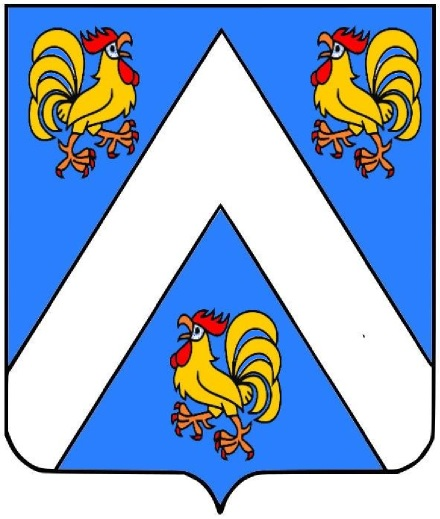 Wapenschild House of Cottereau d'Assche